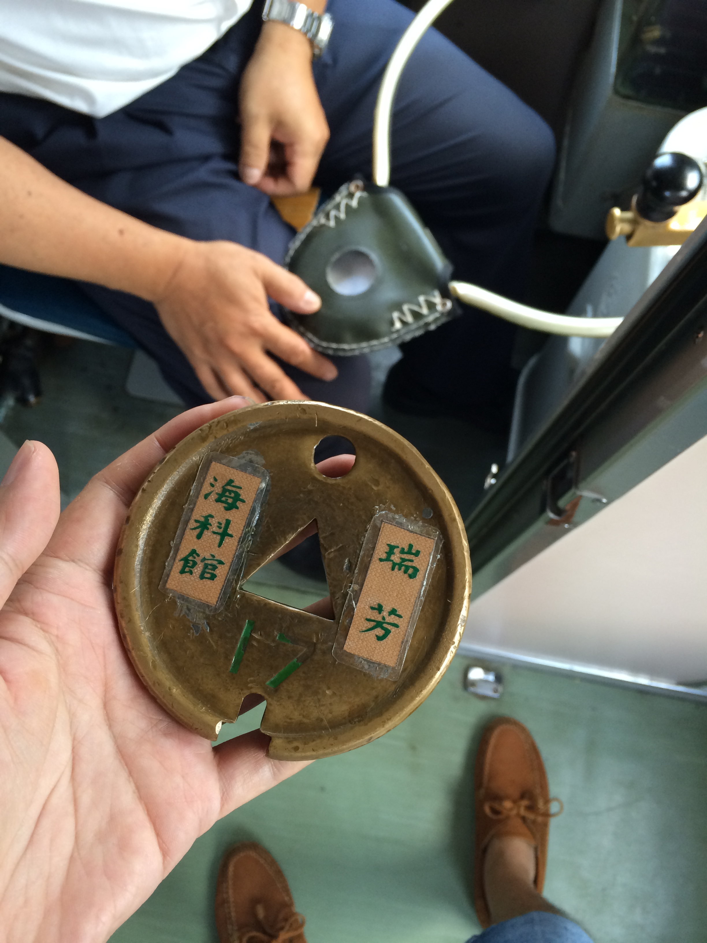 中文（台灣）: 臺灣鐵路管理局深澳線瑞芳－海科館間的路牌。